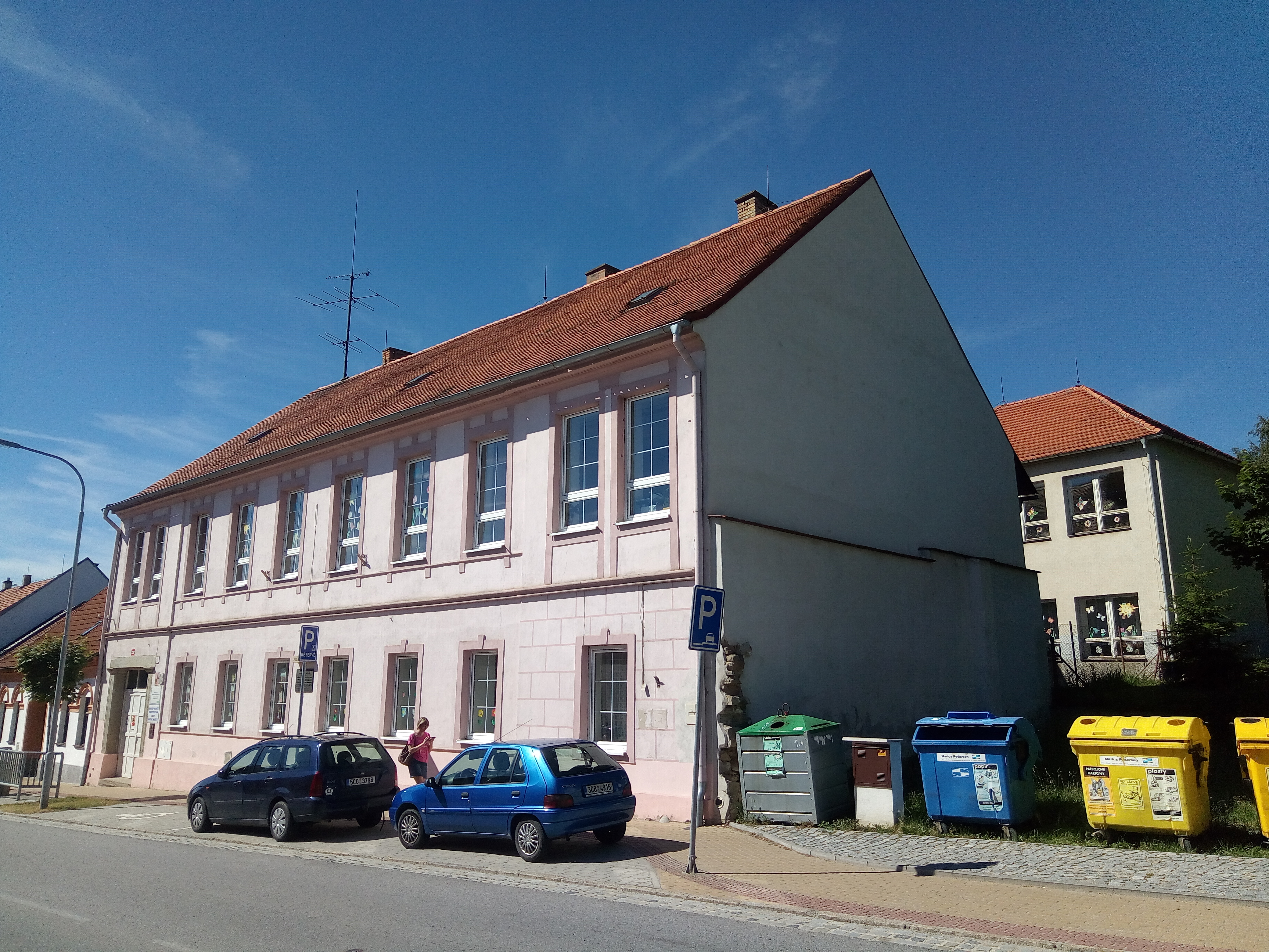 Rodný dům Judr. Emila Háchy